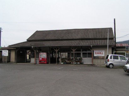 2005/03/26に投稿者が山本駅にて撮影